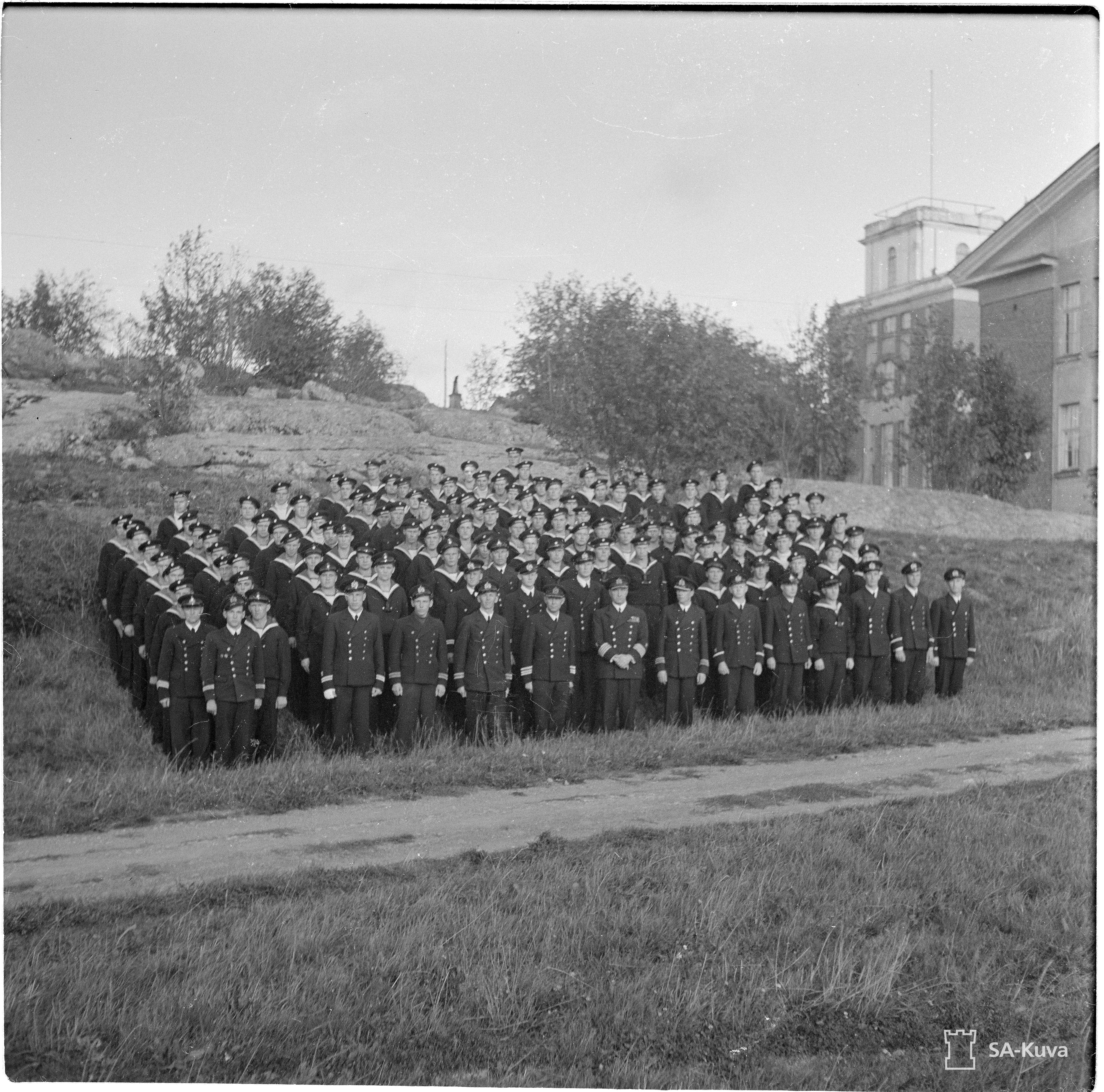 Panssarilaiva Ilmarisen onnettomuudesta selvinneet miehet kuvattuna kaksi päivää sen jälkeen 15.9.1941 Heikkilän kasarmilla Turussa.